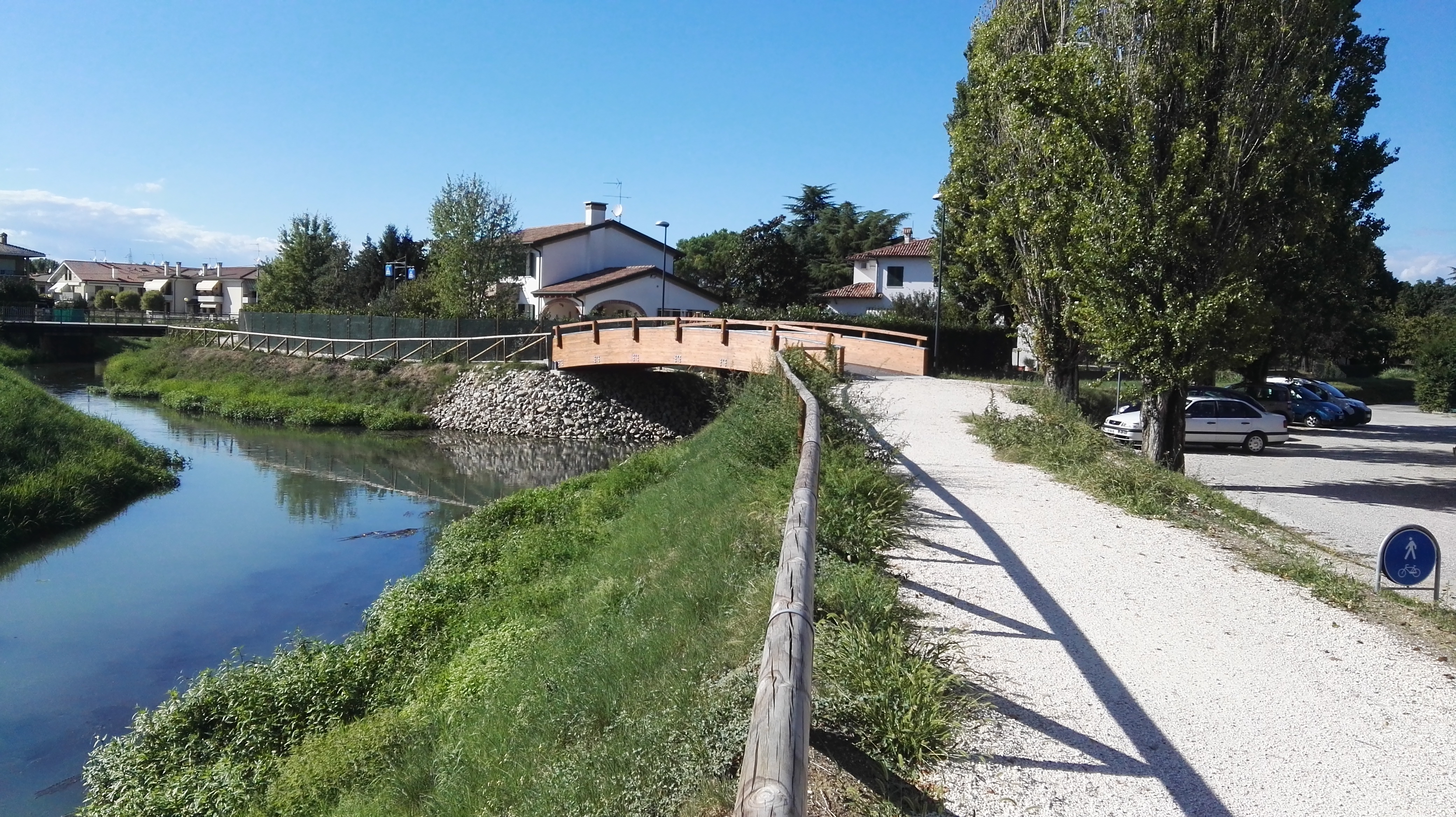 Cristiano28081968 fotocamera personale 2015_09_06 Confluenza del Rio S. Ambrogio nel fiume Dese a Scorzè (VE) Pubblico dominio, rinuncio a tutti i diritti, sono l'autore